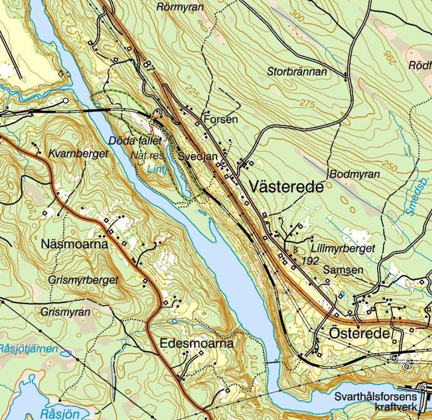 Döda fallet med omnejd. Utsnitt ur Terrängkartan, 689 Bispgården. Kartdata: Lantmäteriet, licens CC BY.